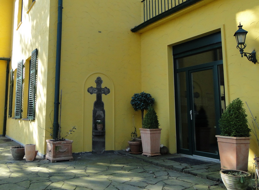 Das Wegekreuz befindet sich in einer Hauswand des Gut Ettenhausen (Ettenhausener Straße 91).